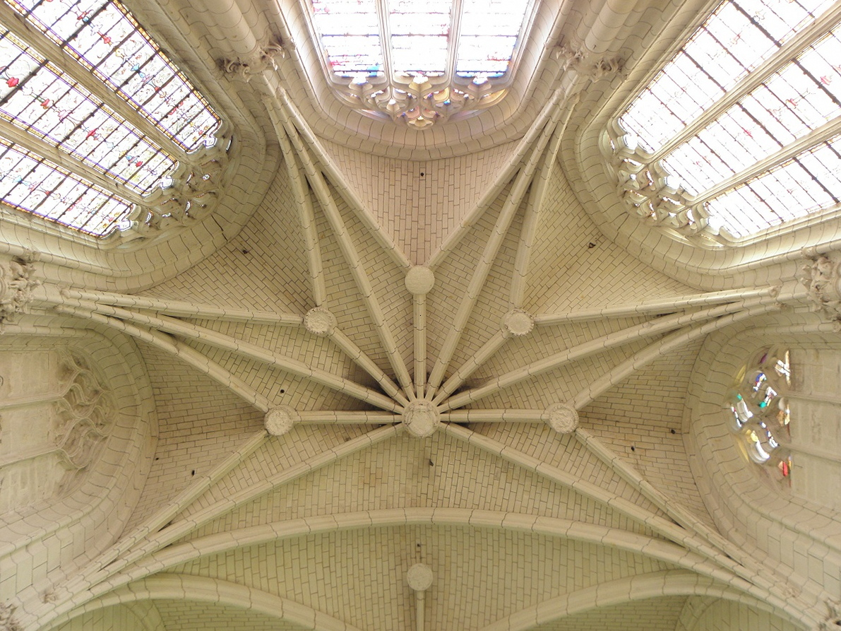 Voûtes de l'abside de la collégiale Saint-Jean-Baptiste de Montrésor (37).